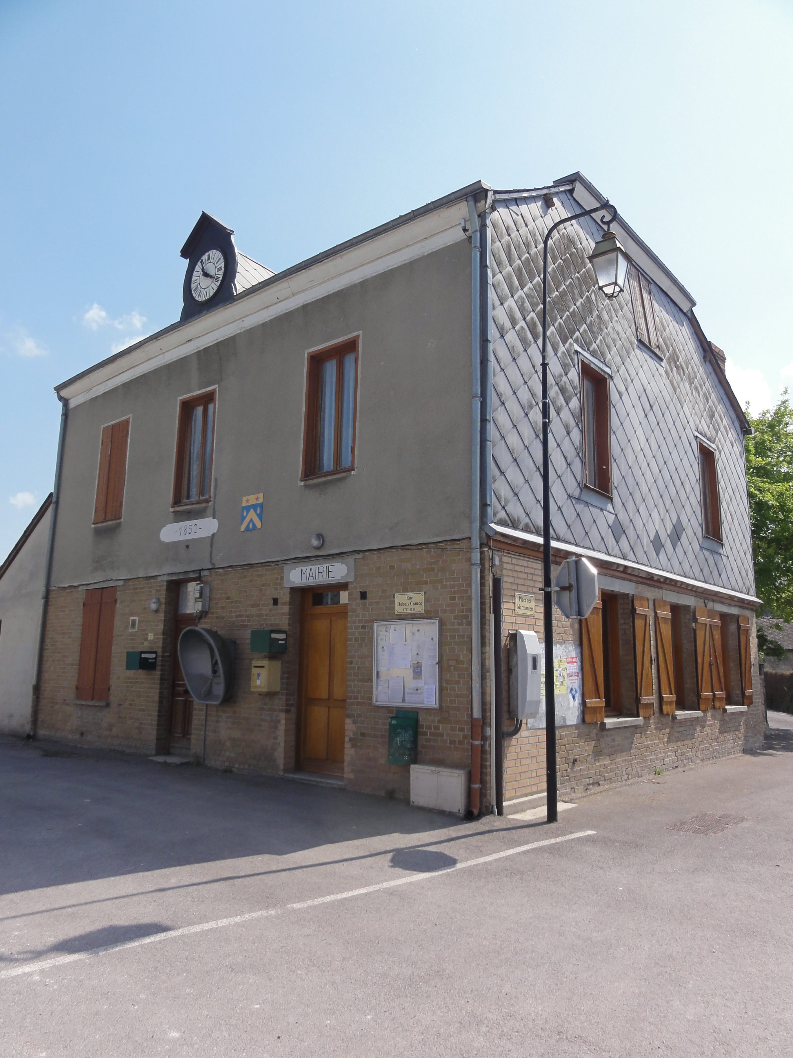 Balham (Ardennnes) Mairie